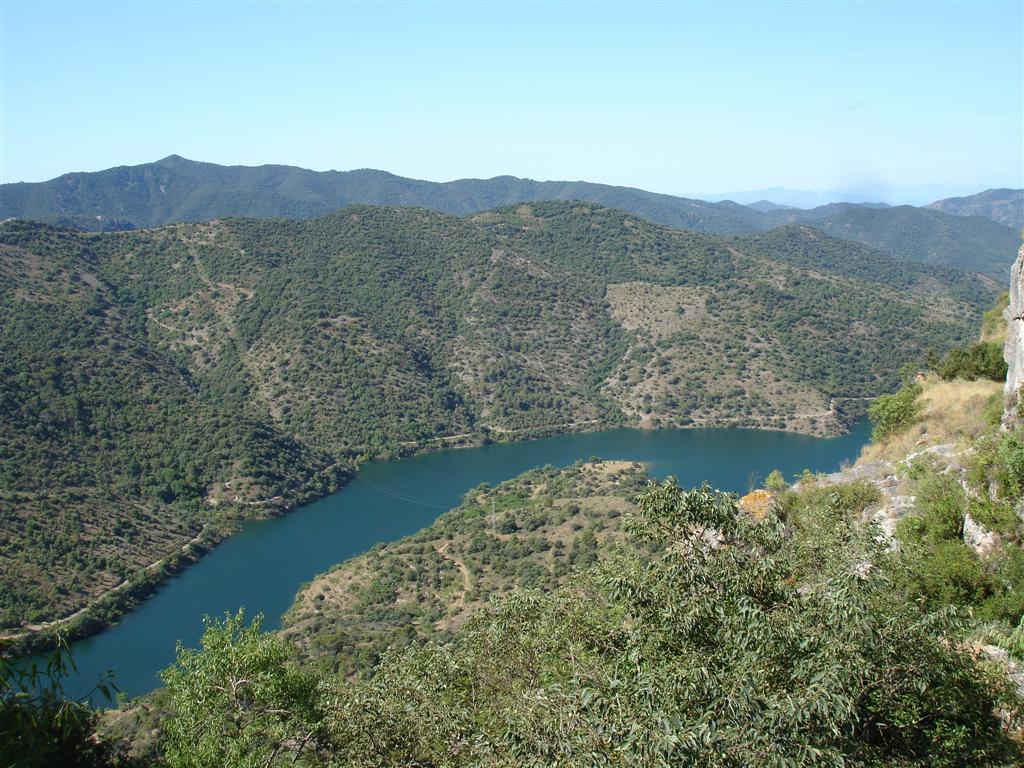 Vista del Pantà de Siurana , comarca del Priorat, des del poble de Siurana